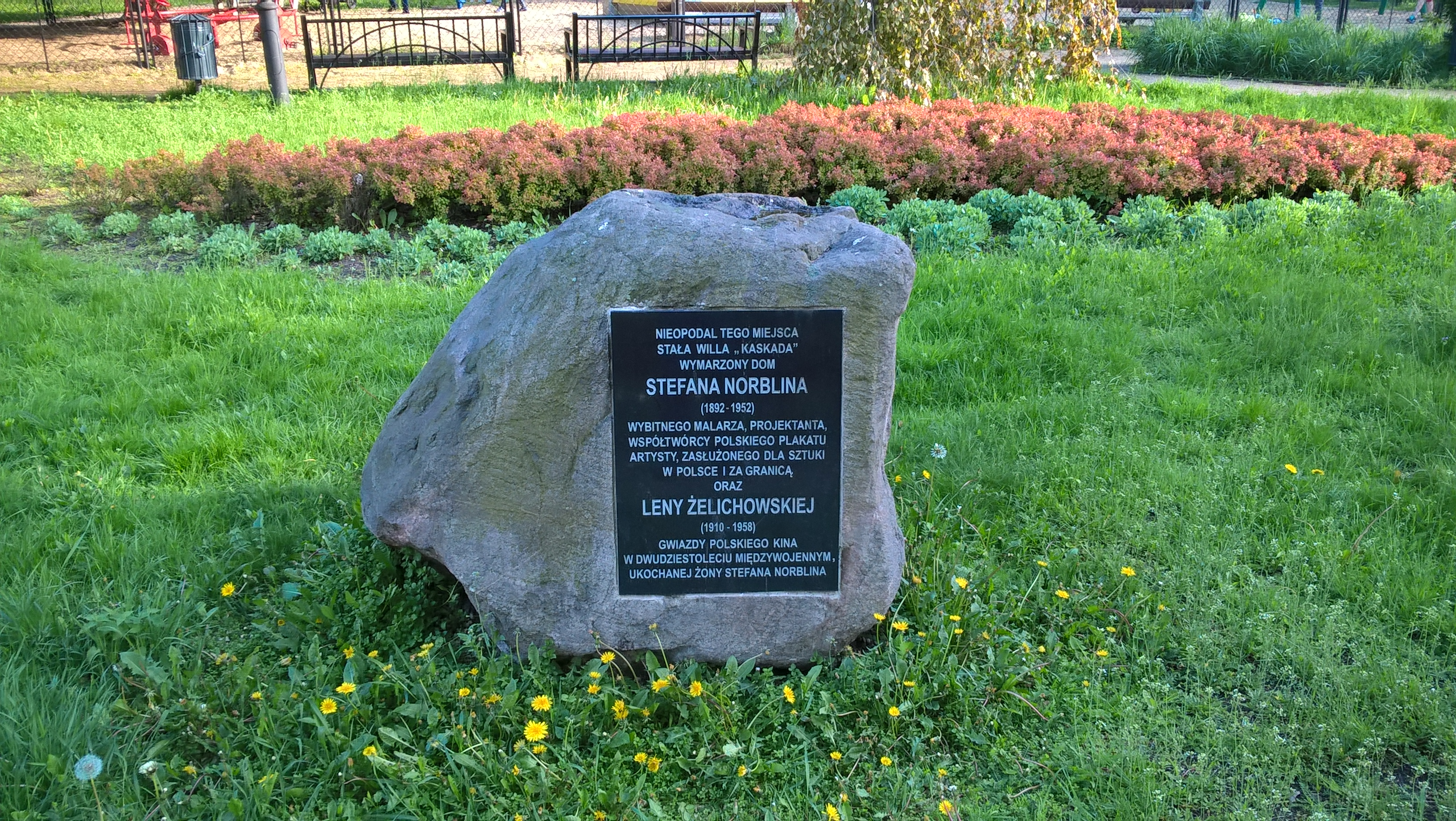 Park Stawy Kellera w Warszawie